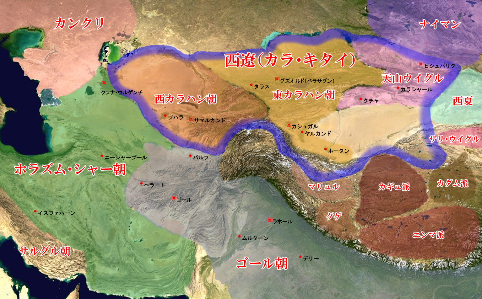 12世紀末、西遼（カラ・キタイ）周辺の国々